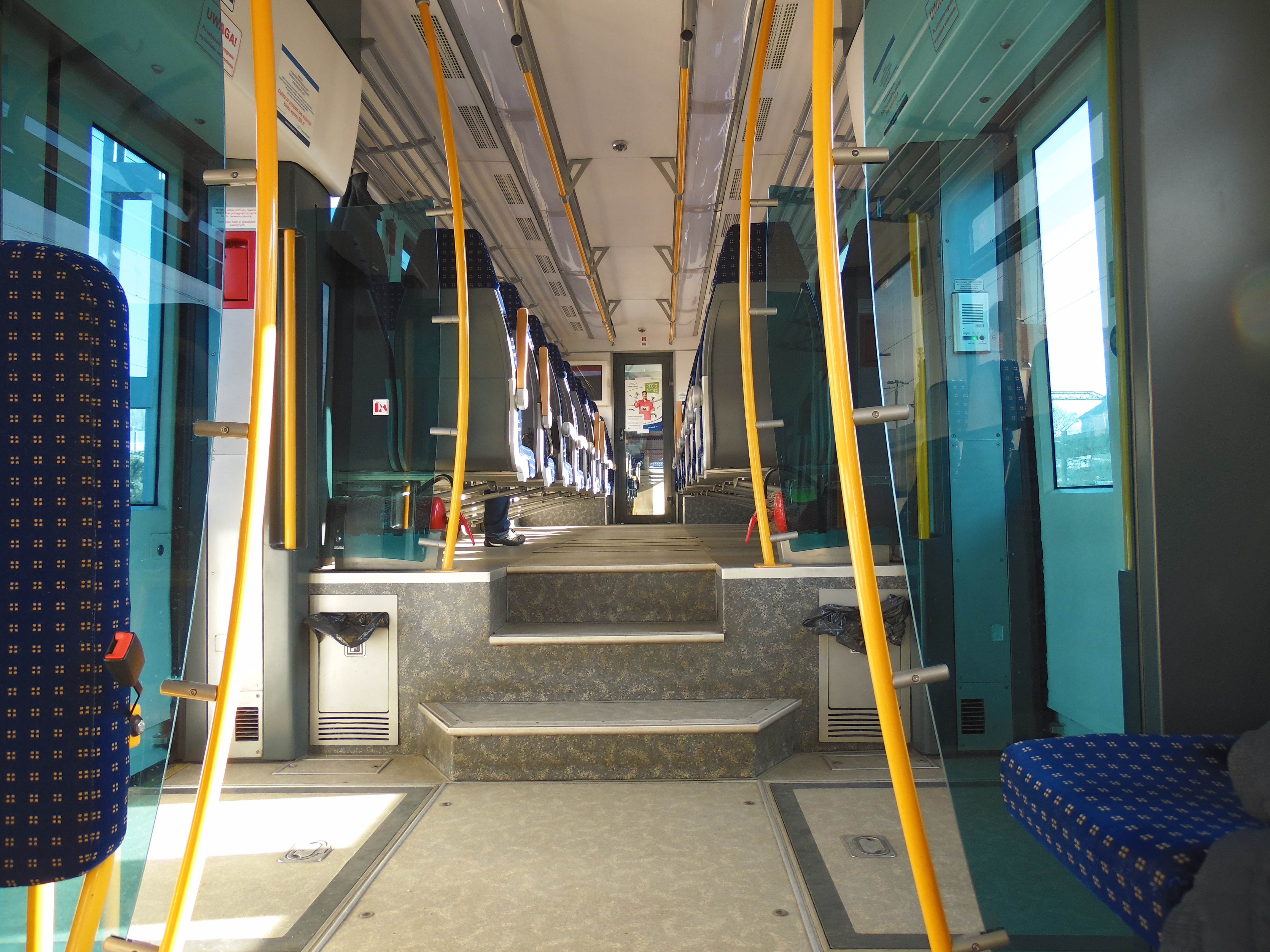 Wnętrze pojazdu SA137.